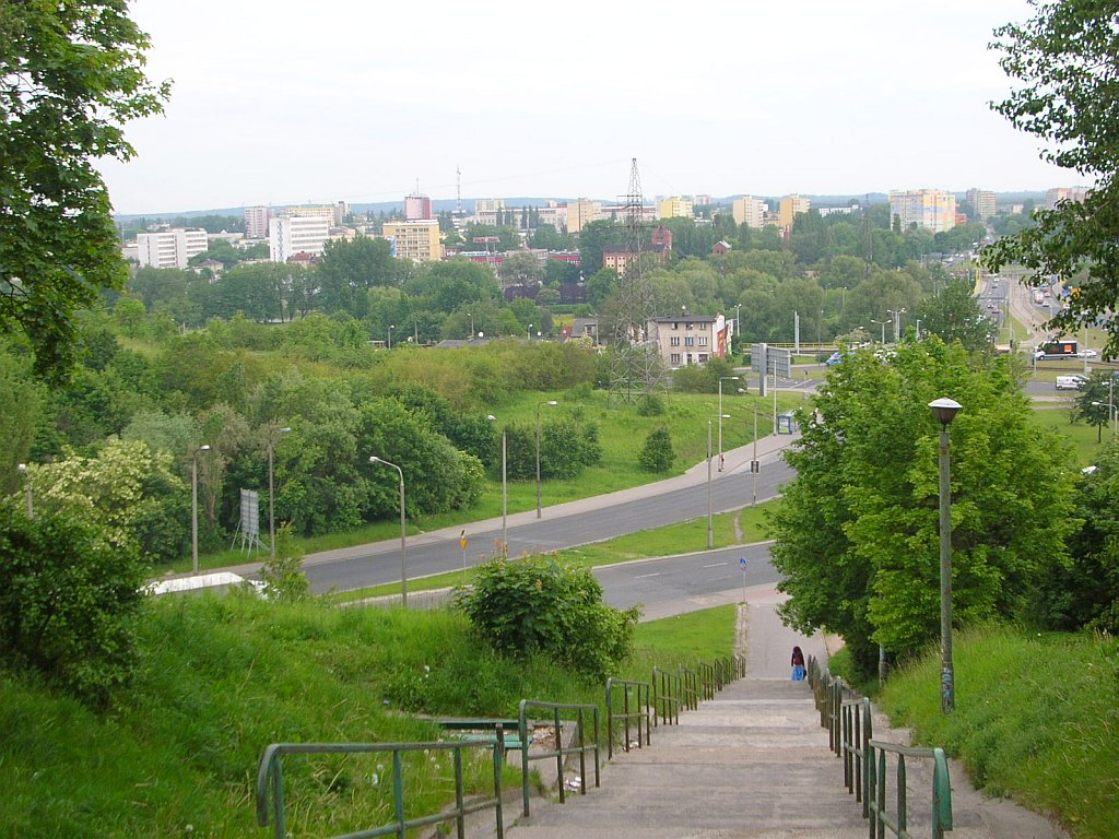 Widok znad schodów na osiedlu Wyżyny w Bydgoszczy